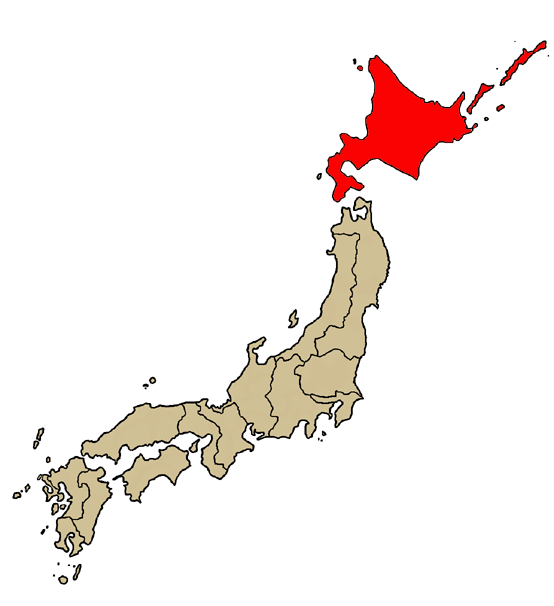 Mappa della diocesi cattolica di Sapporo, in Giappone. Lavoro personale.